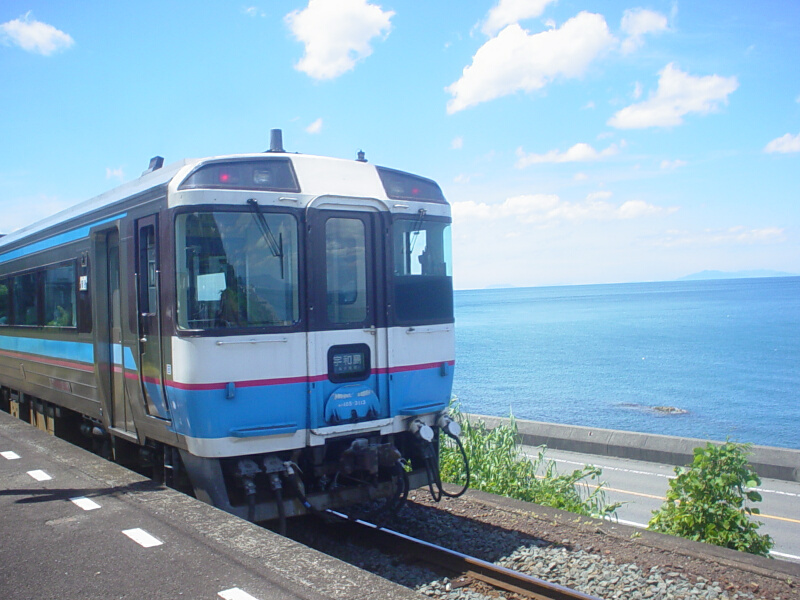 DC185-3113